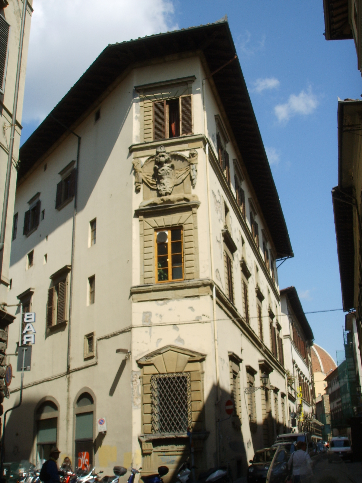 Palazzo mondragone